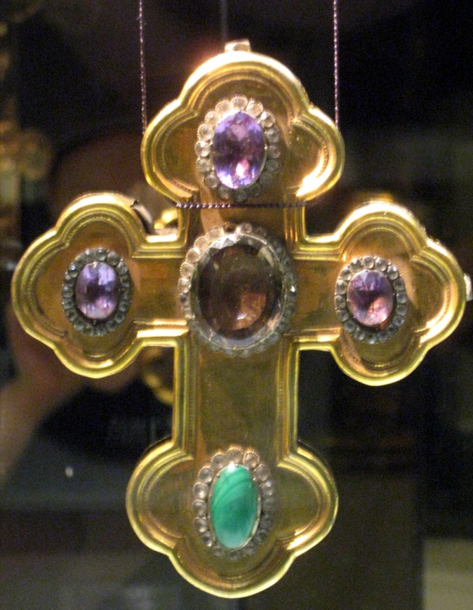 Крест напрестольный, Москва, 1743, Мастер Яков Федоров. Серебро, дерево, позолота, литье, чеканка, канфарение, резьба. Вклад Петра Иванова Хлебоедова, служителя баронов Строгановых, в московскую церковь Николая Чудотворца в Котельниках. Crucifix for above altar, 1743, master Jacov Fedorov